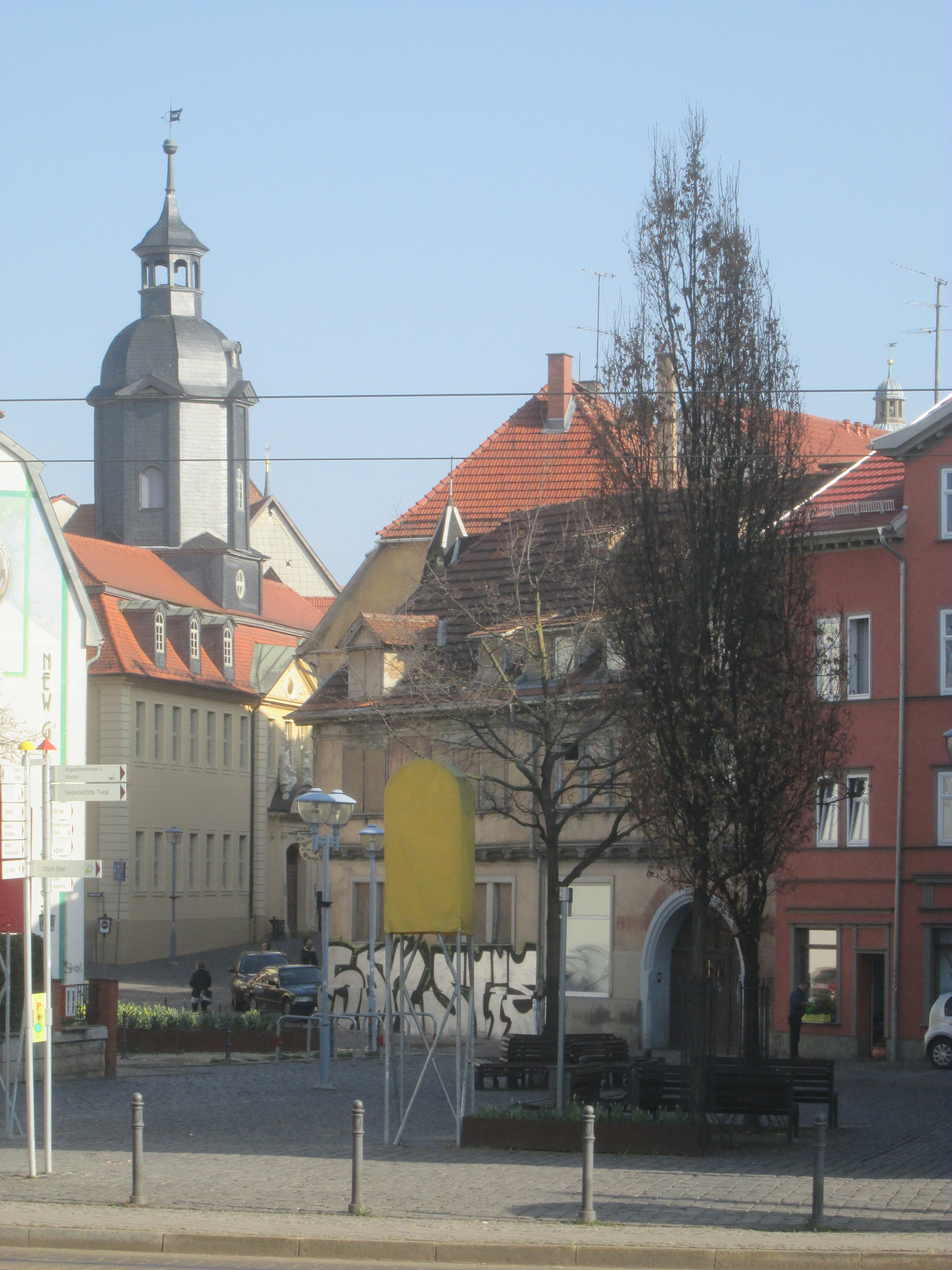 Straße